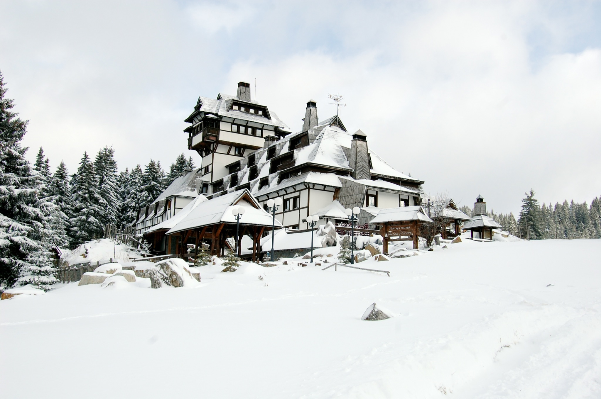 Nebeske Stolice hotel on Kopaonik.